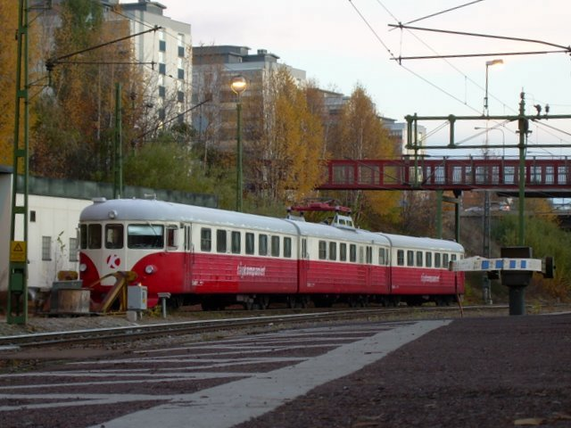 Tågkompaniets rälsbuss X20 202 i Borlänge.